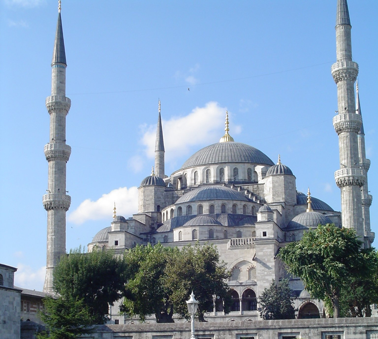 The Blue Mosque